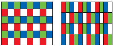 Alternatives del filtre RGBW